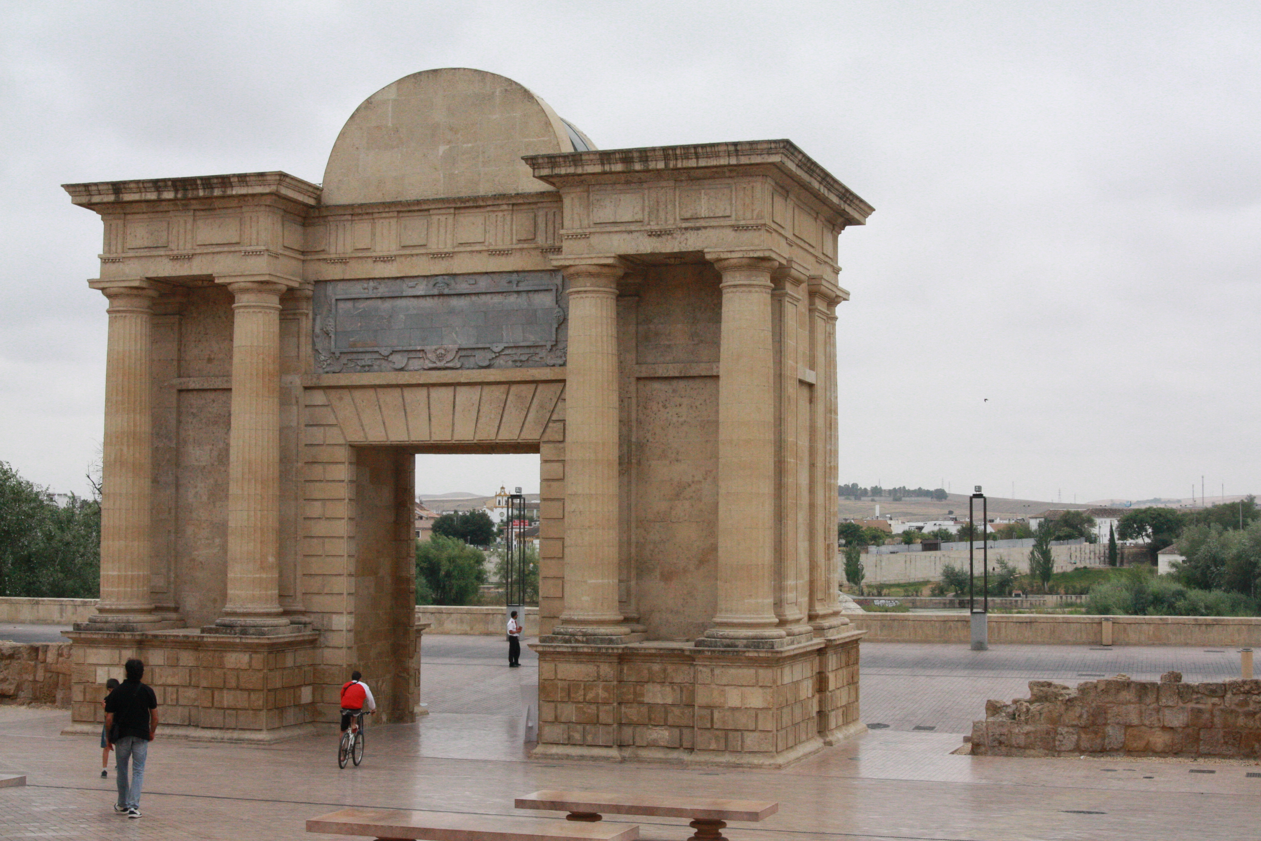 Puerta del Puente, Córdoba (España).